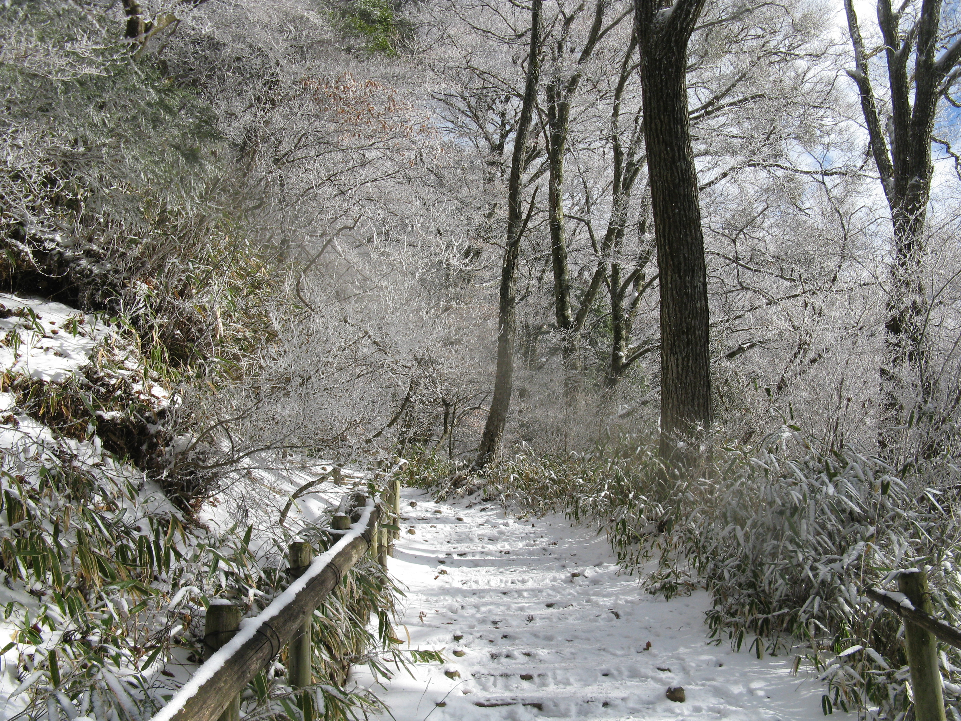 金剛山 千早本道 山頂付近